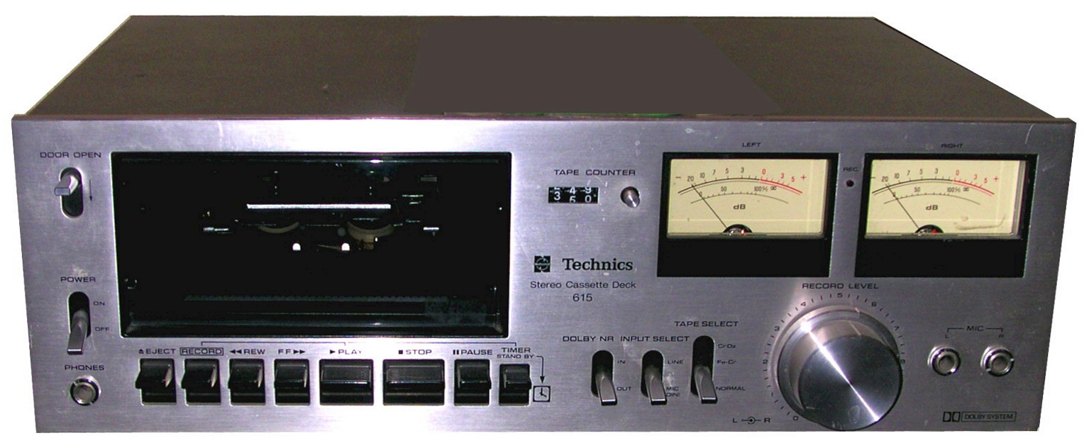 Technics Stereo Kassettendeck 615. Besonderheit dieses Geräts ist die schräge Position der Kassette hinter einer Klappe, die auch während des Betriebs geöffnet werden kann.